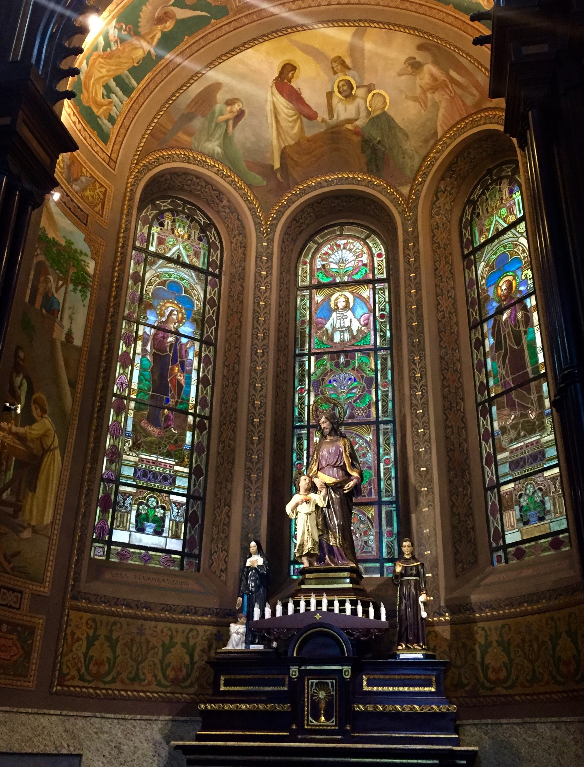 altar baseado em passagens da bíblia, com sua decoração em vitrais